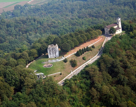 Vista sul colle di San Maffeo da elicottero